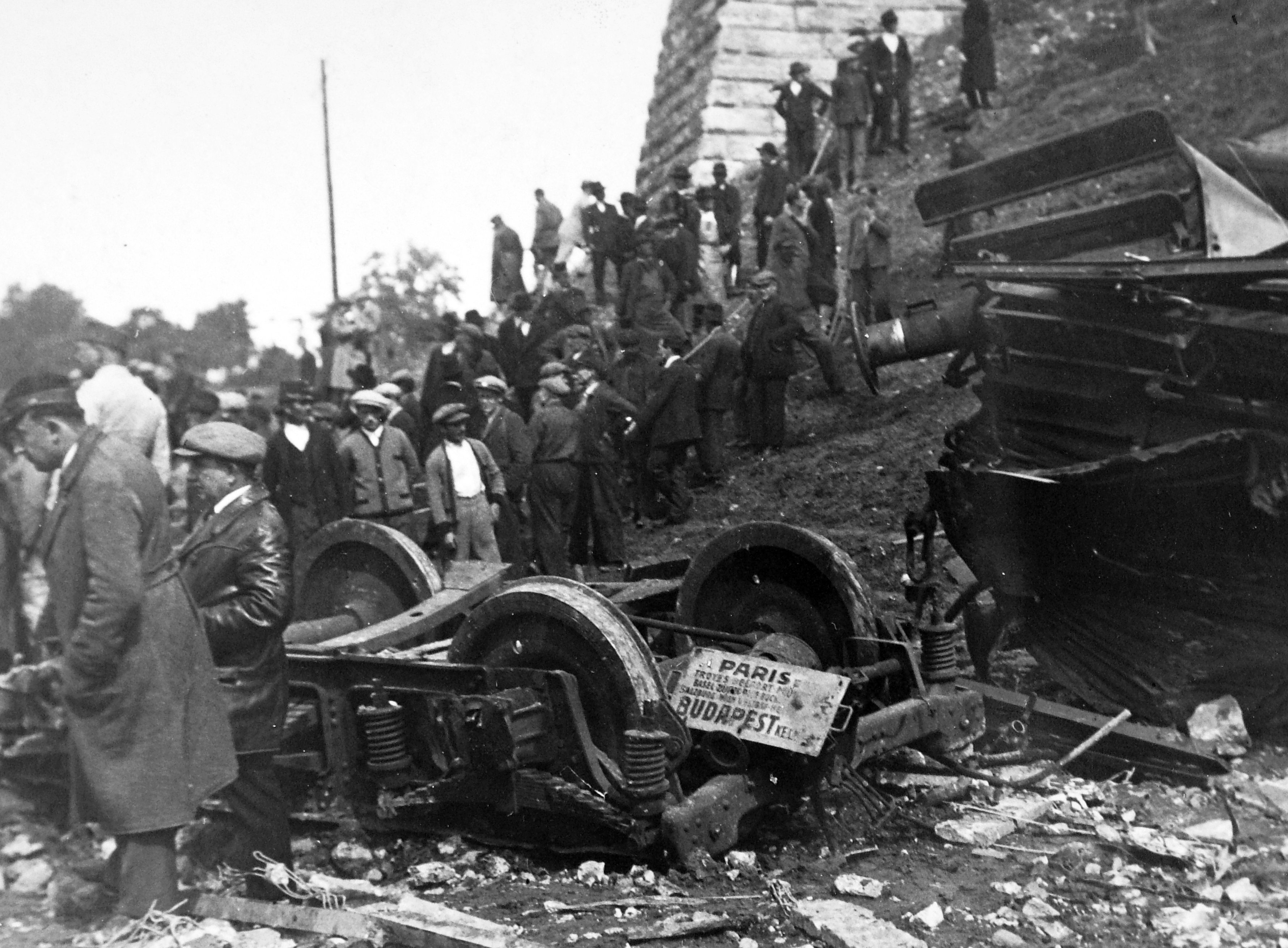 vasúti viadukt az 1931. szeptember 13-i merénylet után. Location: Hungary, Biatorbágy Tags: railway, bridge, Hungarian Railways, wreck, railway bridge, mass Title: vasúti viadukt az 1931. szeptember 13-i merénylet után.